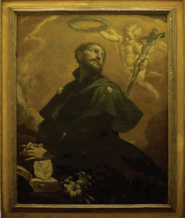 San Giacomo Peinture de Giovanni Anastasi = Saint James, painting by Giovanni Anastasi